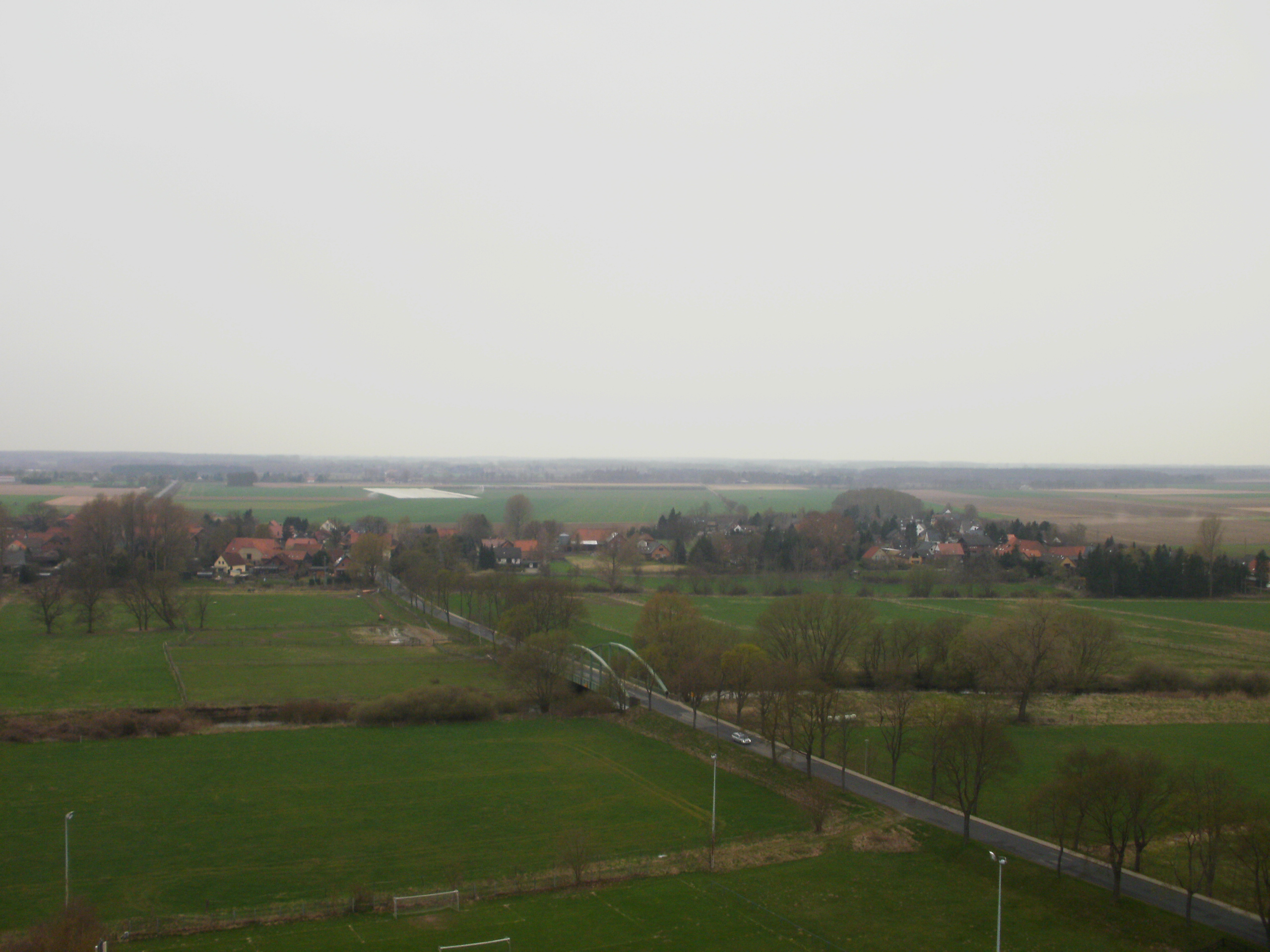 Teilansicht